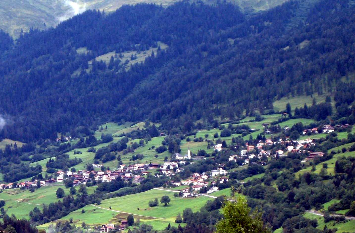 Malix